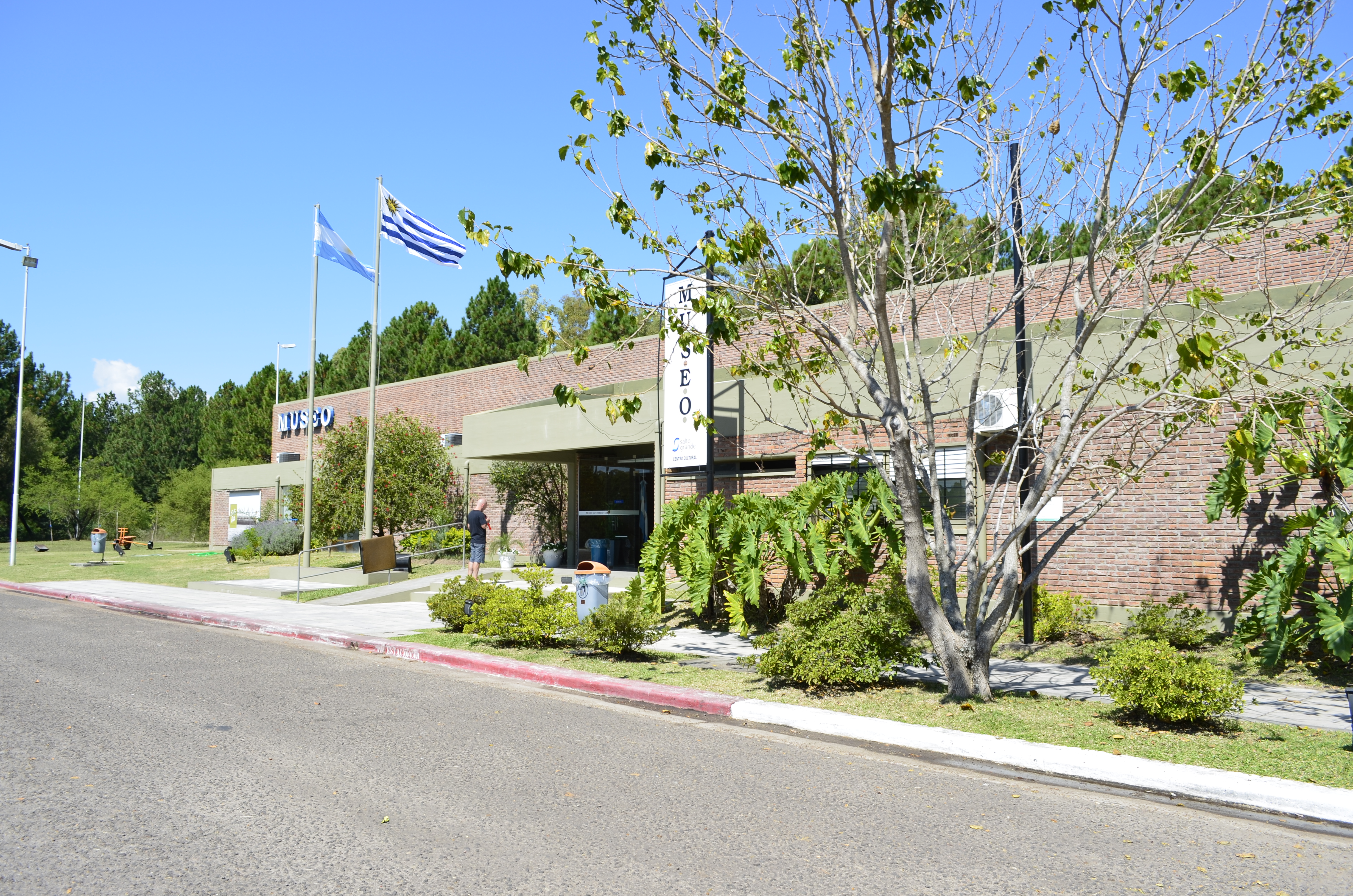 Museo Represa